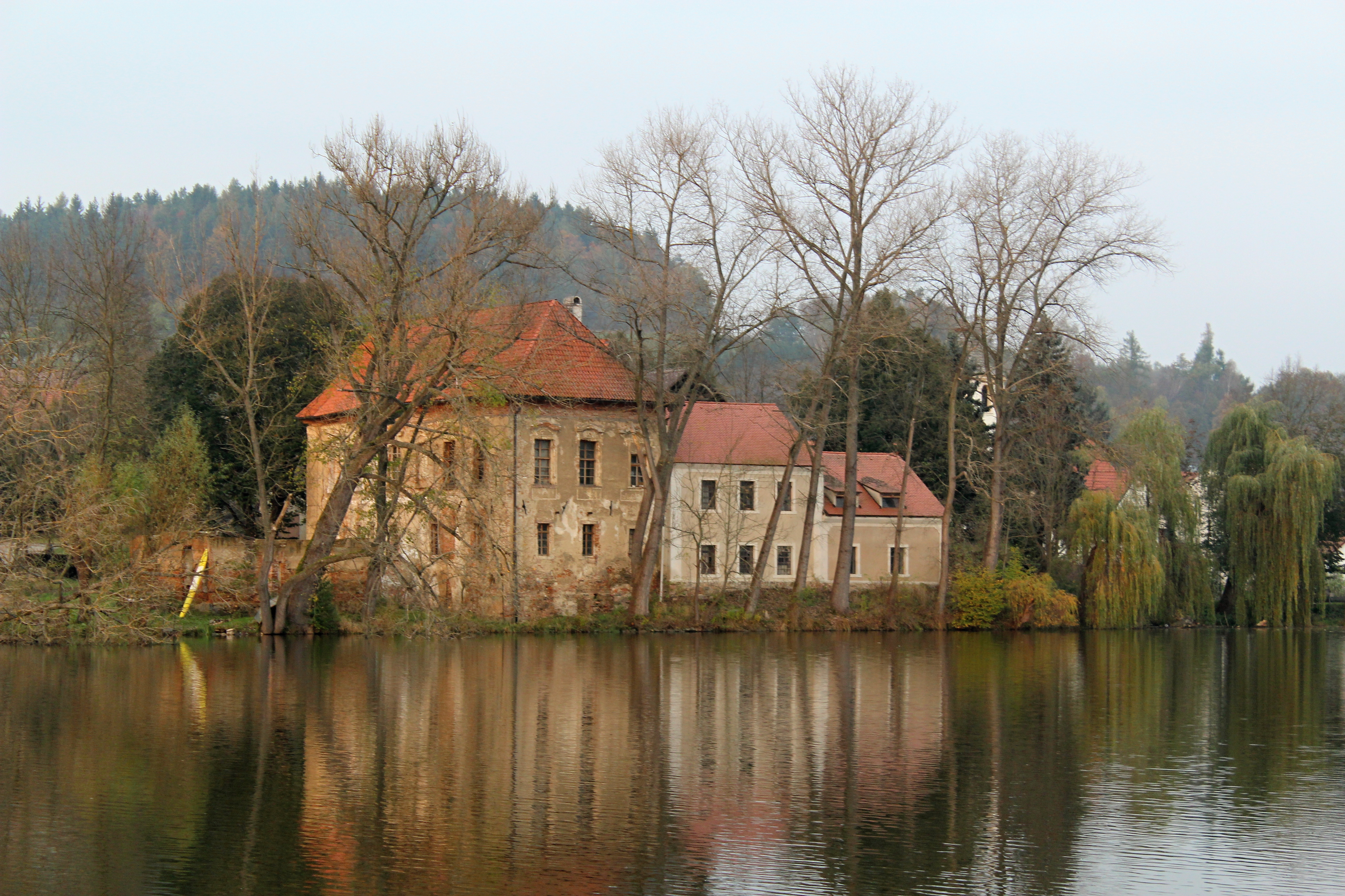 Západní křídlo Vodní tvrze Popovice (okres Benešov) z jižního břehu Popovického rybníka. Tvrz Popovice (Benešov) je vynikající ukázkou vývoje panského sídla od tvrze k renesančnímu a baroknímu zámečku. Snímek ukazuje, že tvrz je situována v centru Popovic a část jejího obranného systému tvořil Popovický (nazývaný dříve Mlýnský, někdy též Zámecký rybník), z jehož jižního břehu je snímek pořízen. Pohled ve směru na jihovýchod na západní křídlo tvrze a na hospodářské budovy nad rybníkem (budovy se šedobílou fasádou), nad kterými prosvítá štítová stěna novodobé nástavby gotické věže. Vlevo od západního křídla tvrze jsou viditelné zbytky zdiva odstraňovaného lihovaru. Vpravo východně od tvrze mezi stromy prosvítá věž kostela sv. Jakuba Většího.